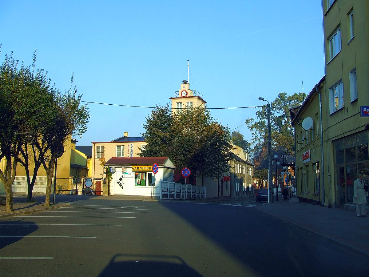 Rypin main square